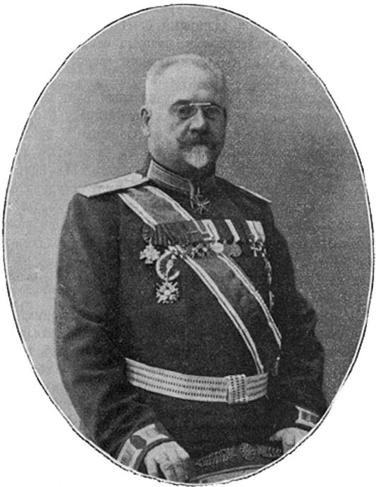 Владислав Францевич Бауфал — генерал-майор, герой сражения на Шипке (1853—1914).